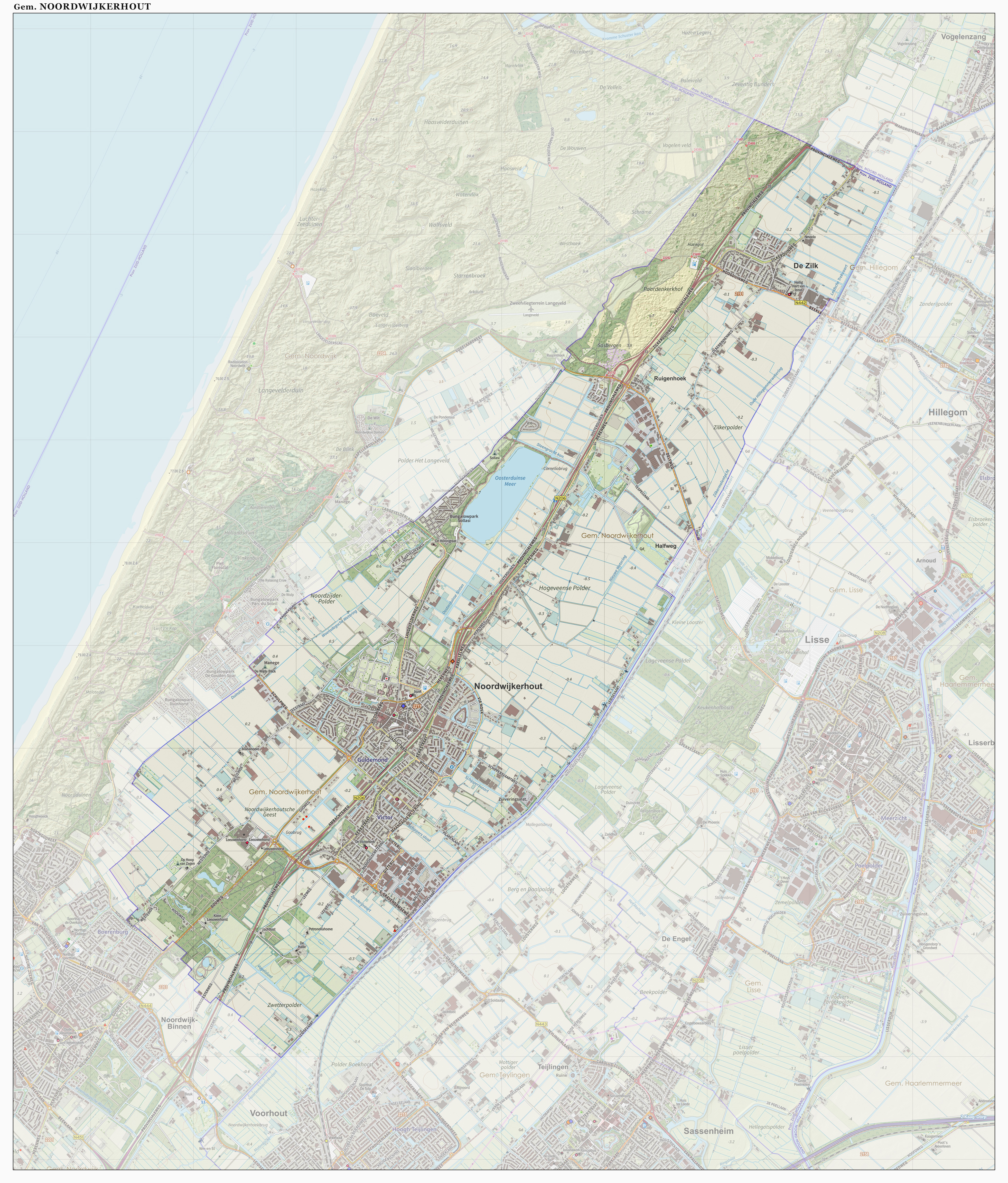 Topografische gemeentekaart. Resolutie: 400 pixels/km. Kaartbeeld samengesteld uit de open geodata van de Top10NL en Top25namen (Kadaster), Creative Commons-BY licentie. Gebouwvlakken uit open geodata BAG extract. Wegen uit de OpenStreetMap, OpenStreetMap community. Reliëfschaduw uit de Actuele Hoogtekaart AHN2. Samenstelling en kleurenschema: Jan-Willem van Aalst, met QGIS. Zie ook de Legenda.